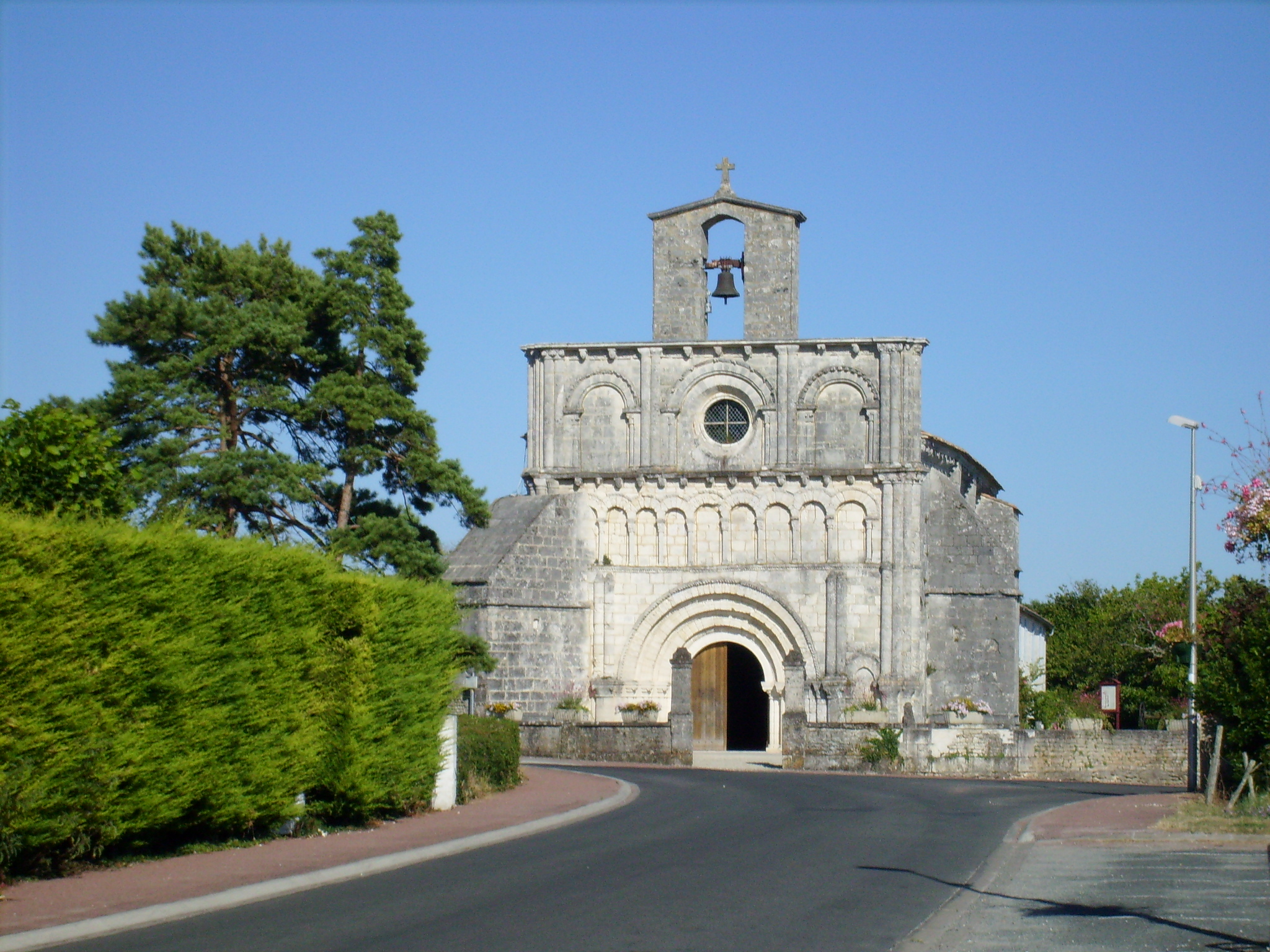 L'église de Breuillet